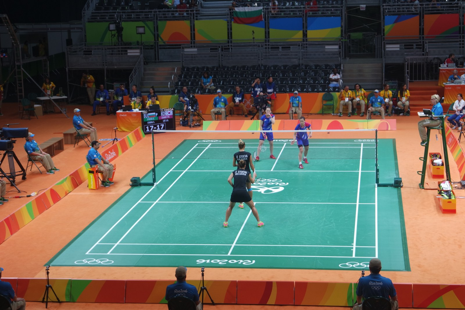 Badminton